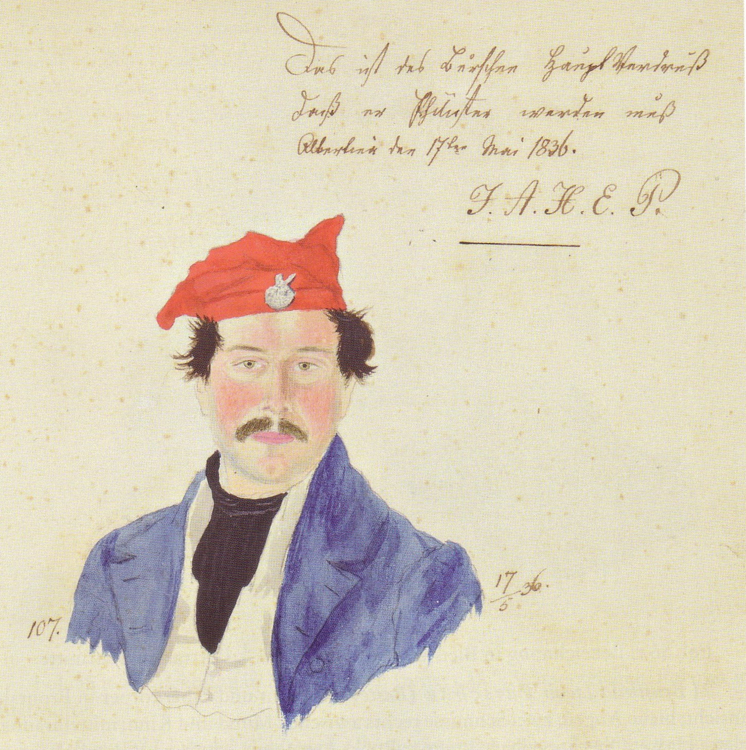 Aquarellporträt von Julius von Pastau (1813-1889)